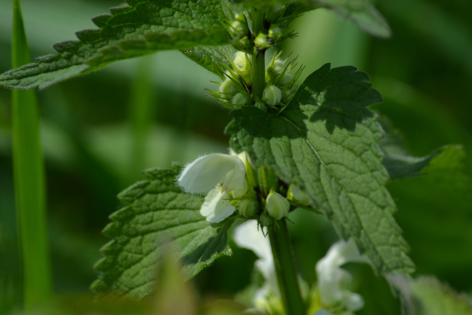 Jasnota biała